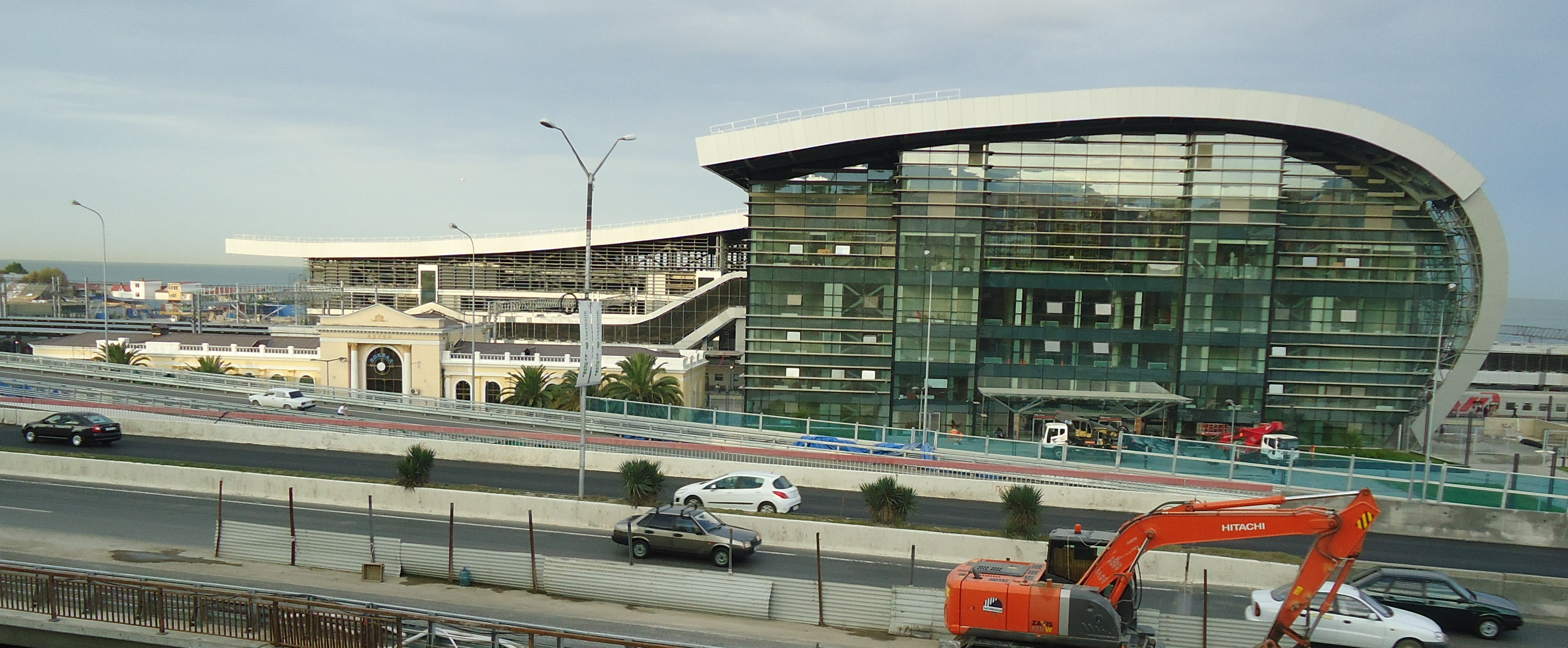 Новый железнодорожный терминал станции Адлер